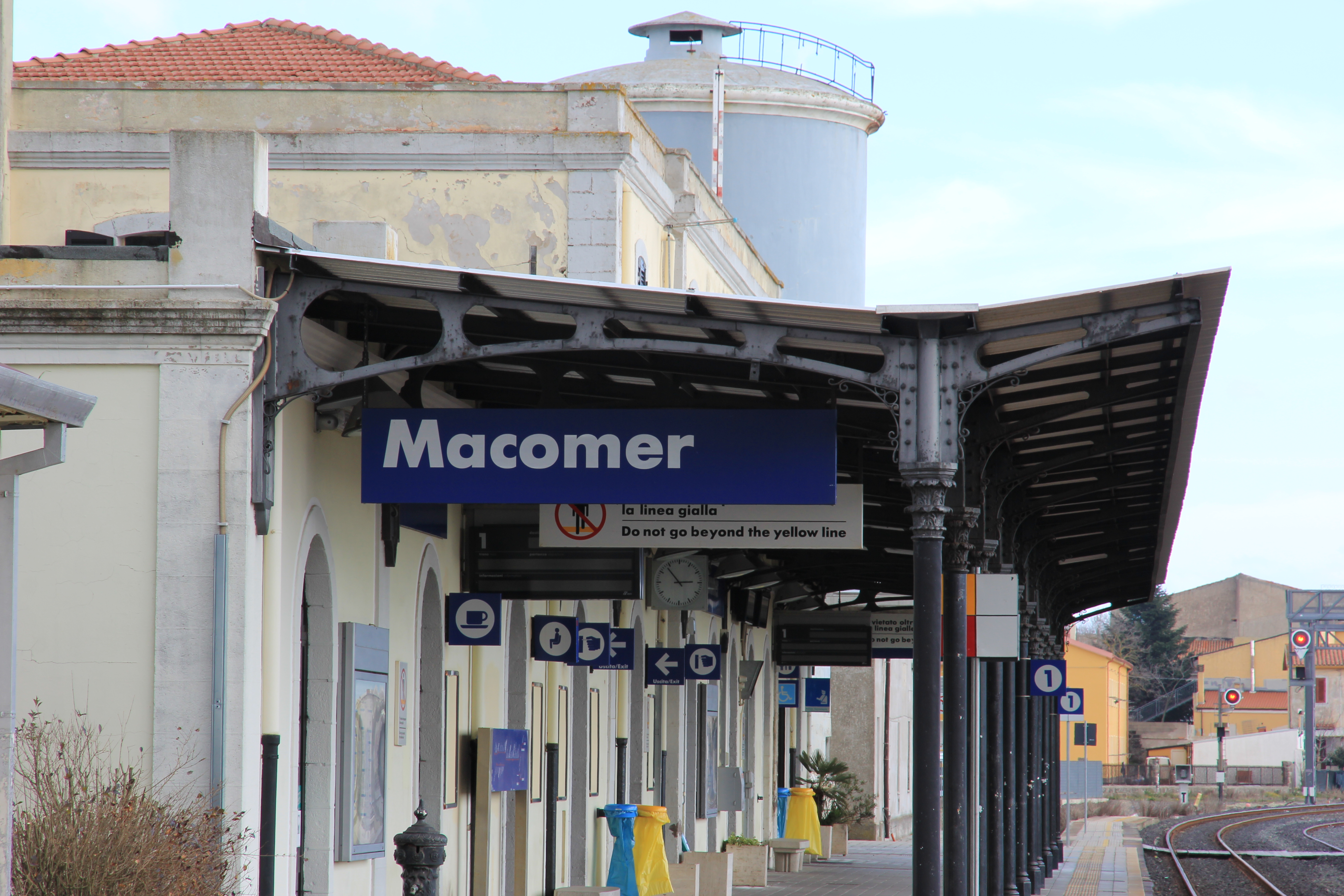 Stazione ferroviaria FS di Macomer